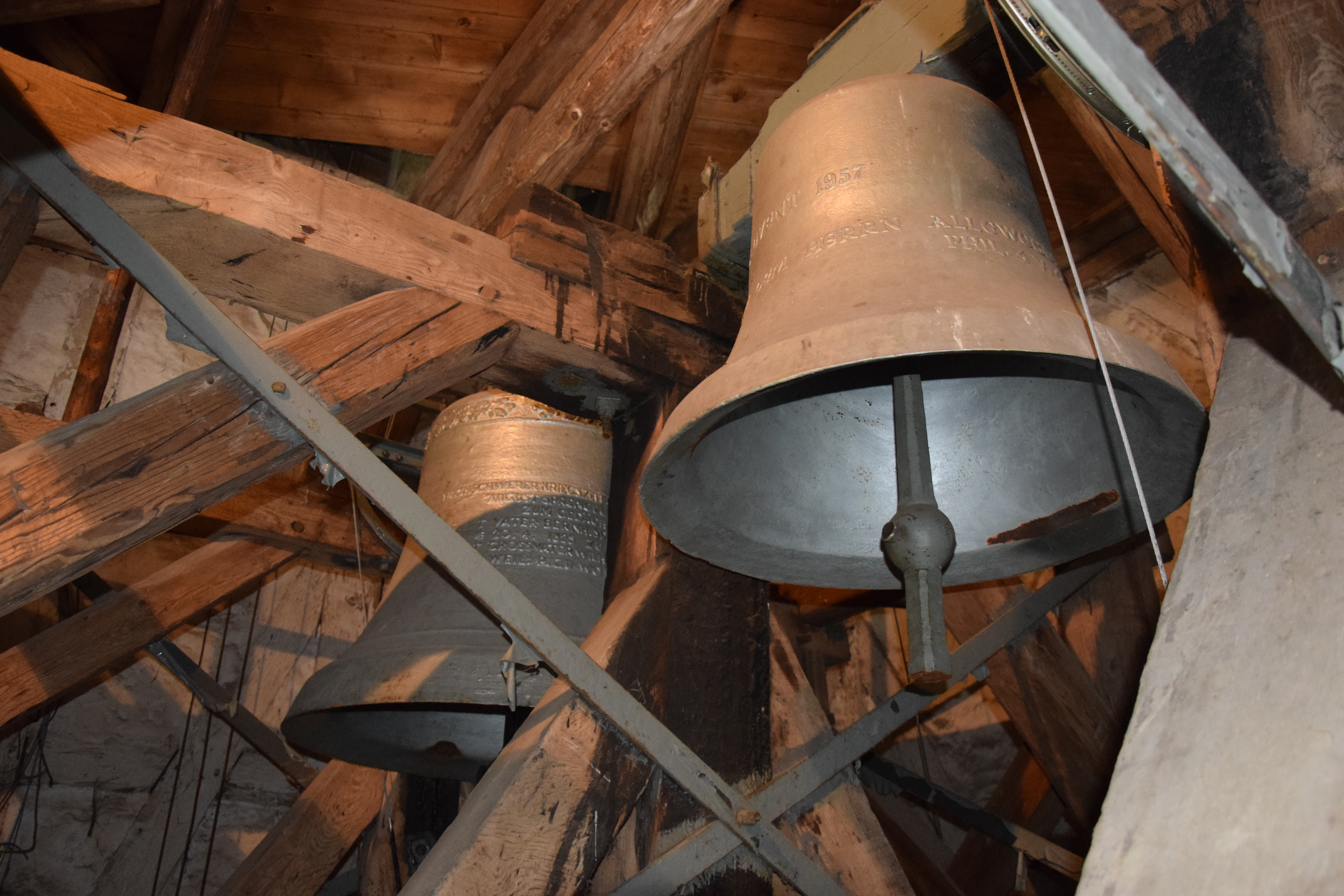 Glocken der St. Marien-Kirche Wollershausen mit den Schlagtönen b' und des